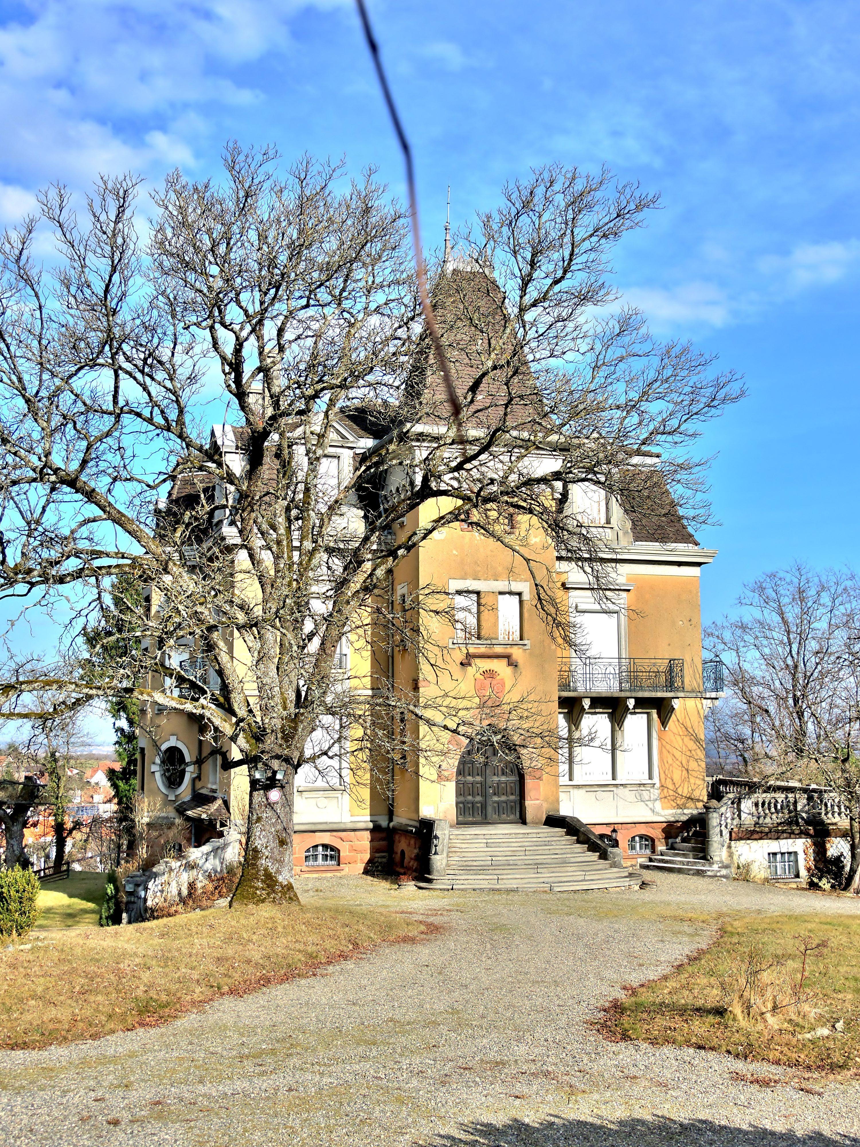 Château Hagenbach, dominant le village de Wattwiller, Haut-Rhin.